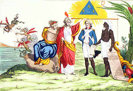 Les Mortels sont égaux, kolorierter Kupferstich eines unbekannten Künstlers (1791) Die personifizierte Vernunft hält die Messlatte der Gleichkeit über einen Weißen und einen Farbigen; der Farbige hält die von der Assemblée constituante verabschiedete Erklärung der Menschen- und Bürgerrechte in der einen Hand und das Dekret vom 15. Mai 1791, mit dem die Bürgerrechte auch den Farbigen zuerkannt wurden, in der anderen; auf der linken Seite sind die auf der Flucht befindlichen Dämonen der Aristokratie der Ungerechtigkeit und des Egoismus zu sehen.